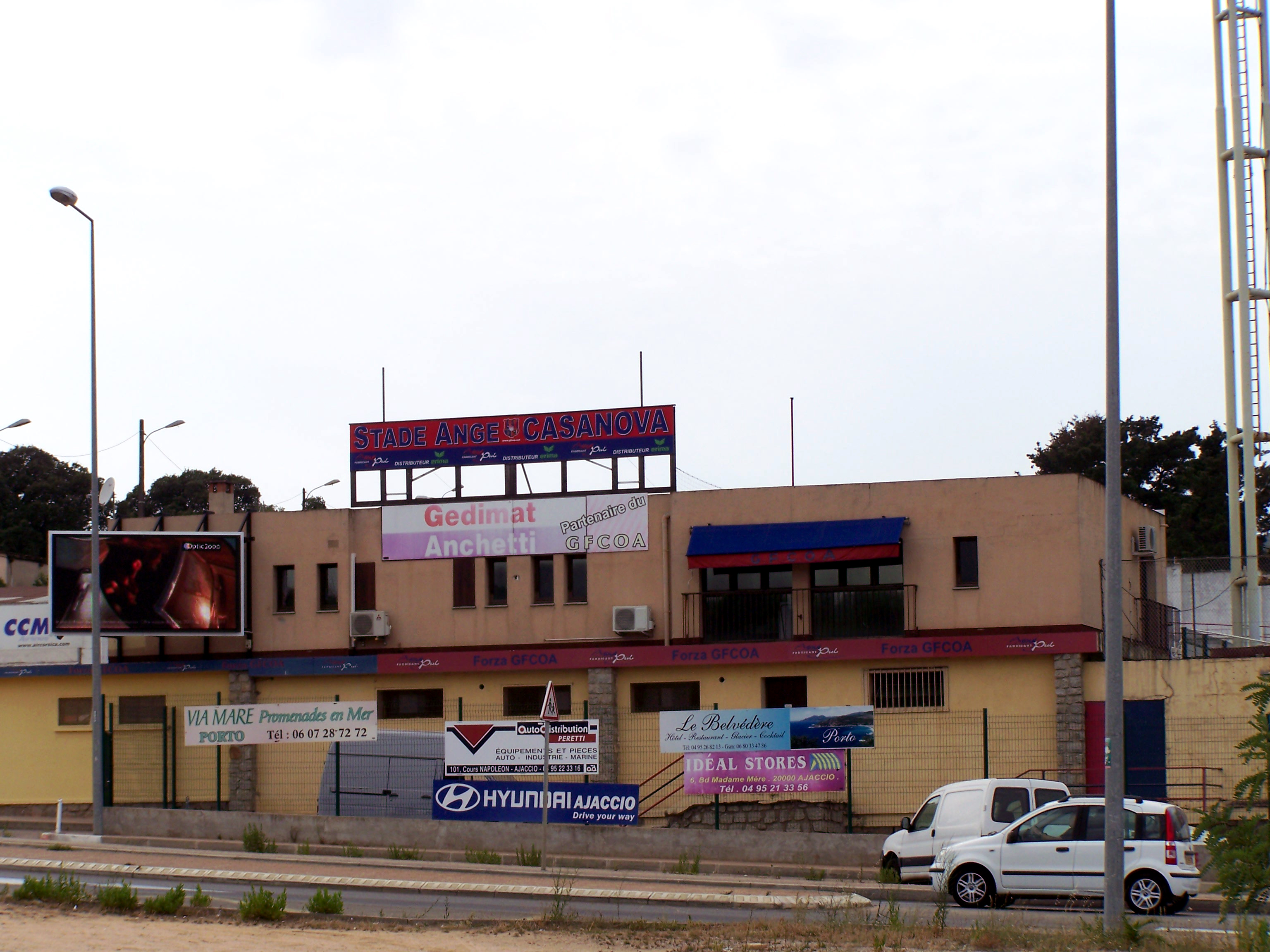 Extérieur du Stade